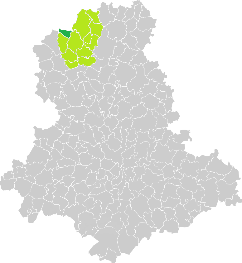 Carte de situation de la commune de Thiat (en vert foncé) dans le votre Canton (en vert clair) sur une carte des communes de la Haute-Vienne